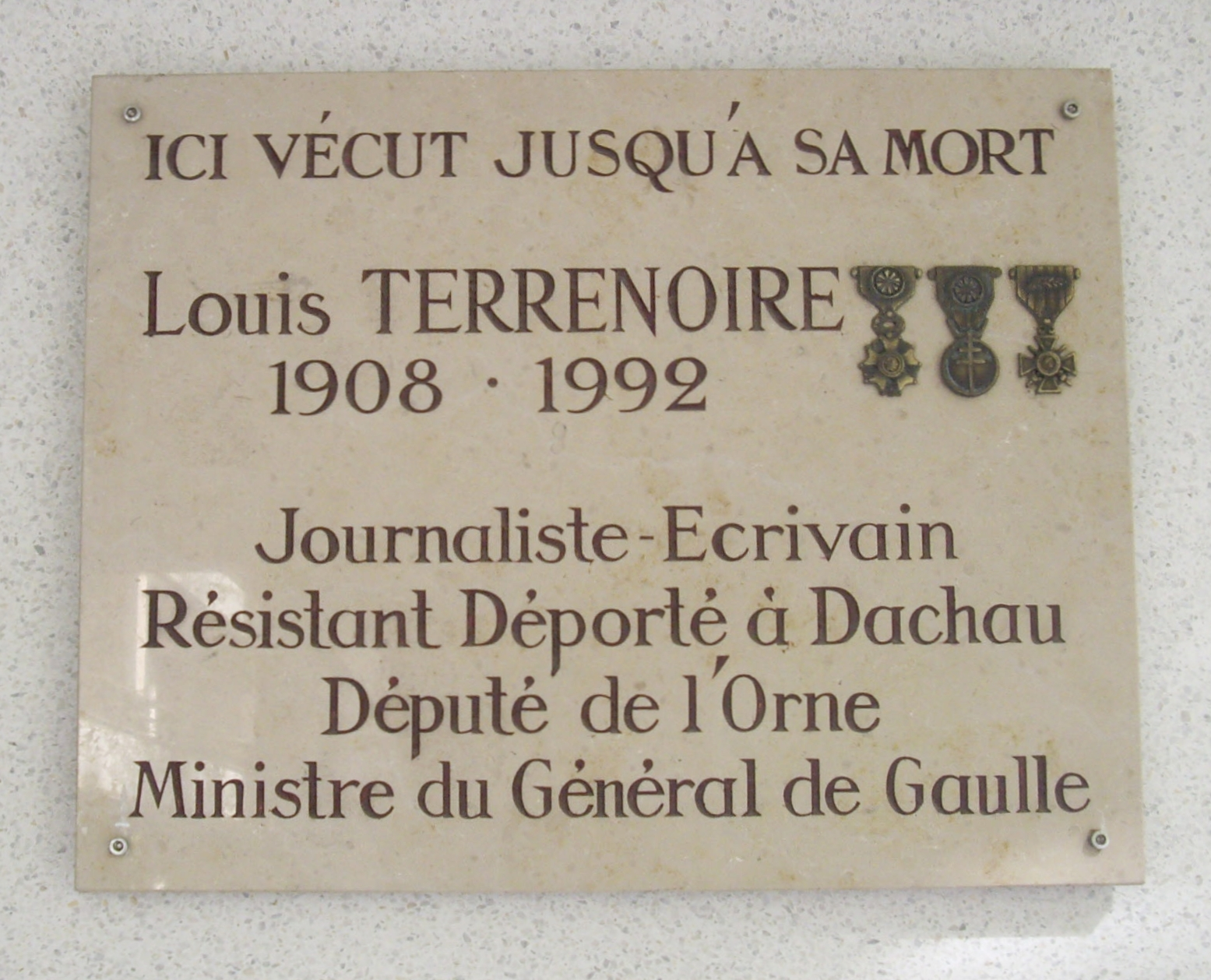 Plaque commémorative, 6 rue de Rémusat, Paris 16e. « Ici vécut jusqu'à sa mort Louis Terrenoire, 1908-1992, journaliste-écrivain, résistant déporté à Dachau, député de l'Orne, ministre du général de Gaulle. »